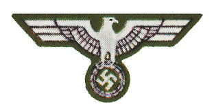 Mützenabzeichen (Wehrmacht)